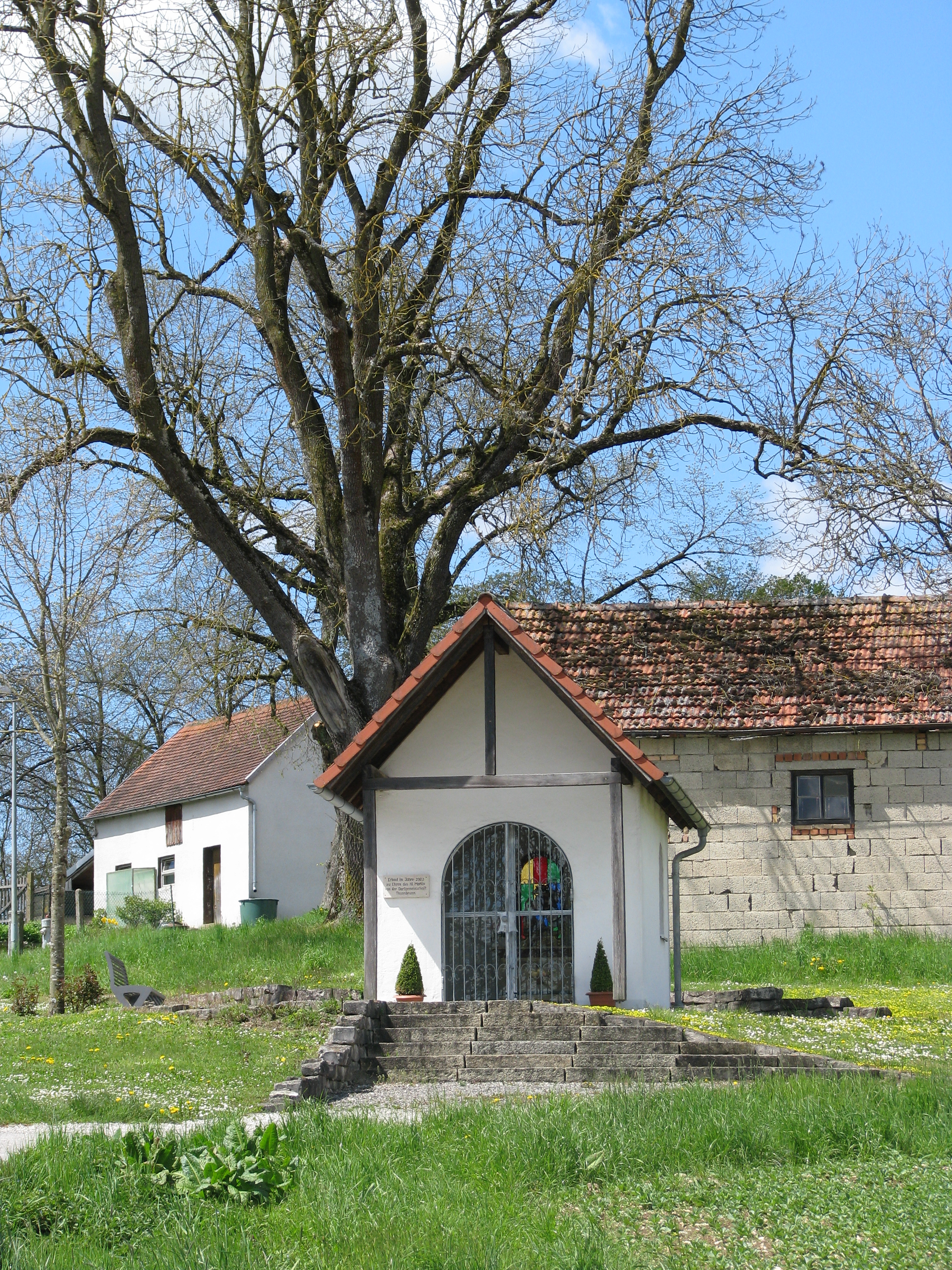 Thannbrunn, Ortsteil von Berching im bayerischen Landkreis Neumarkt in der Oberpfalz, Dorfkapelle St. Martin, erbaut 2002